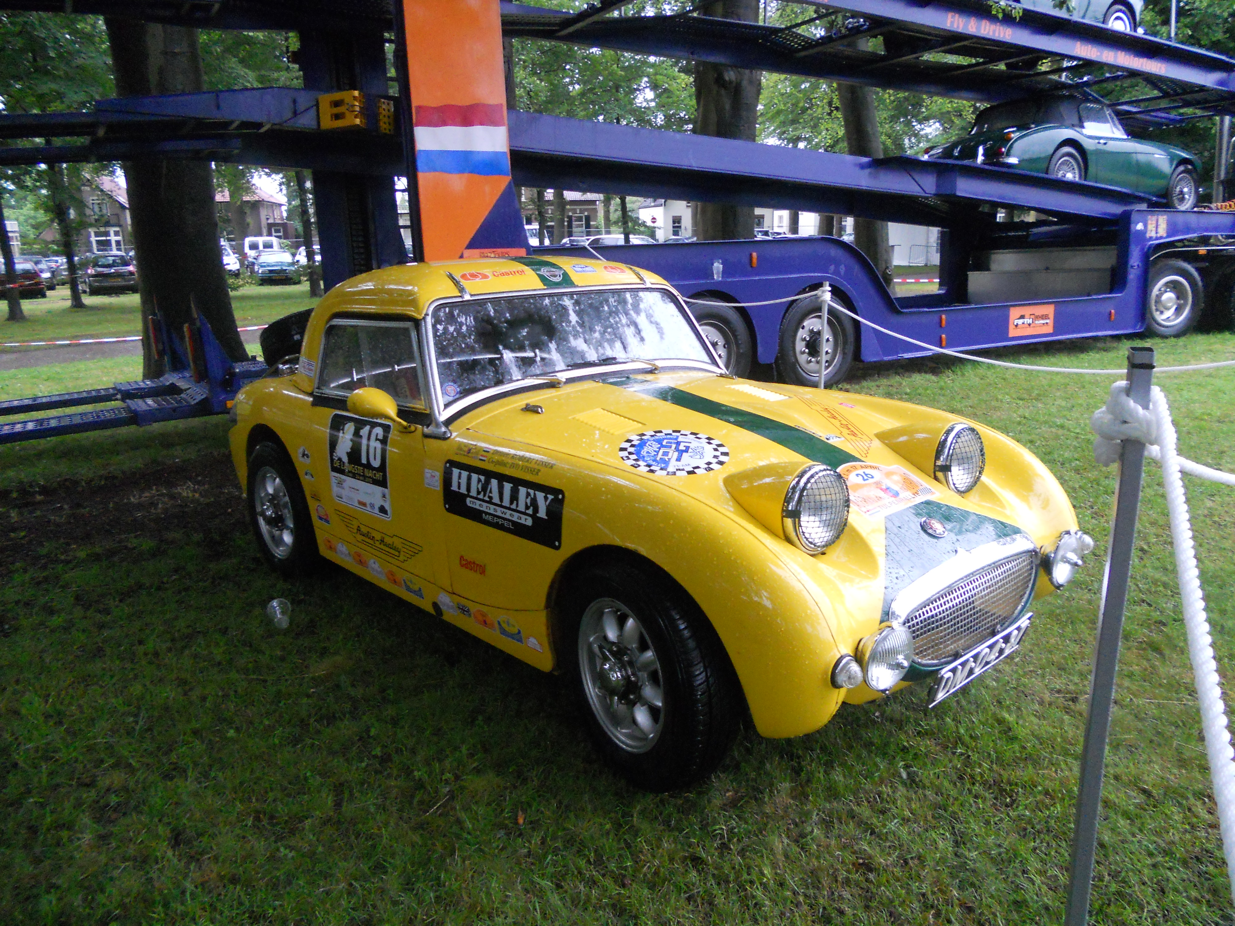 Concours d'Elegance 2012